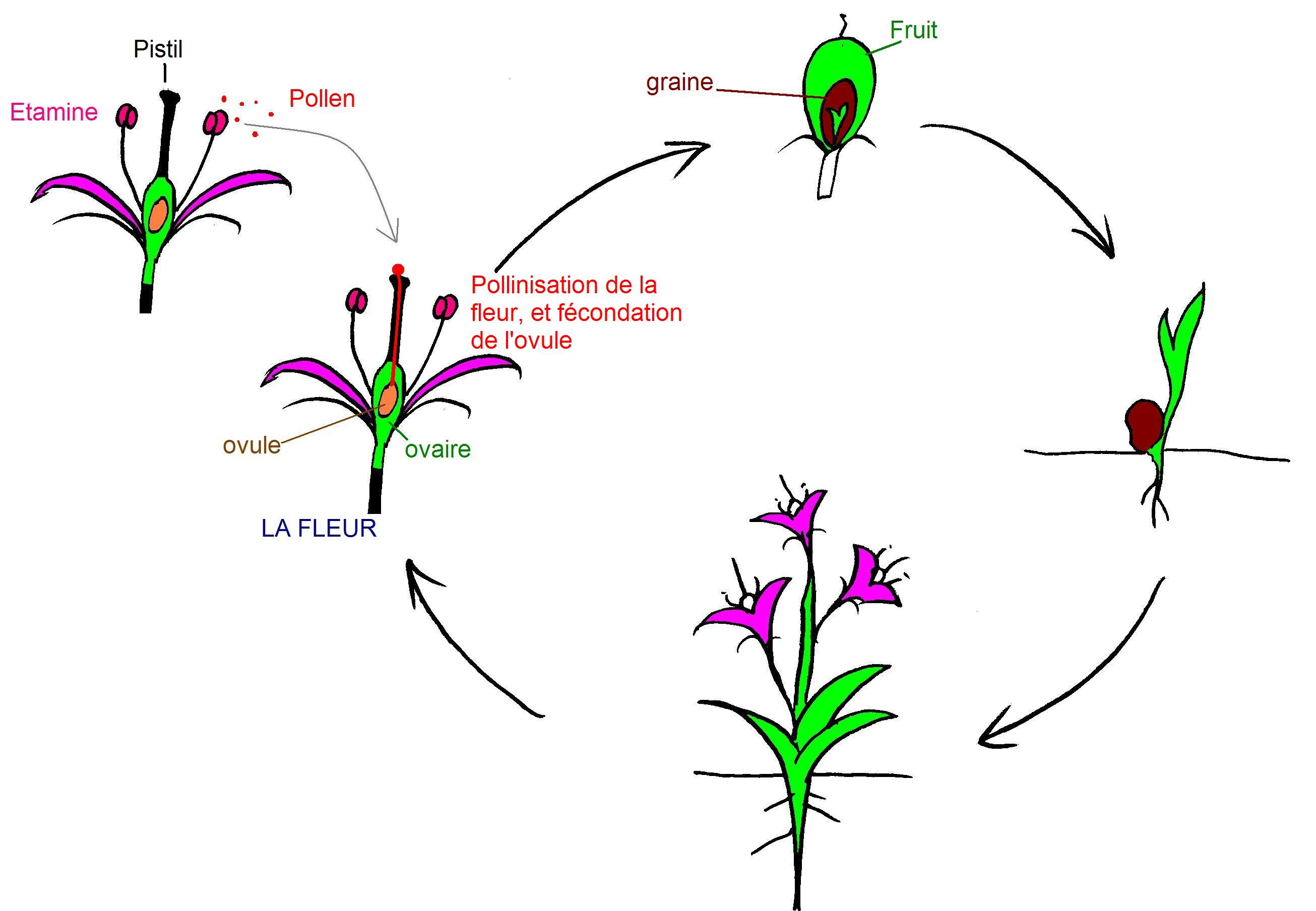 Schema_du cycle_des angiospermes